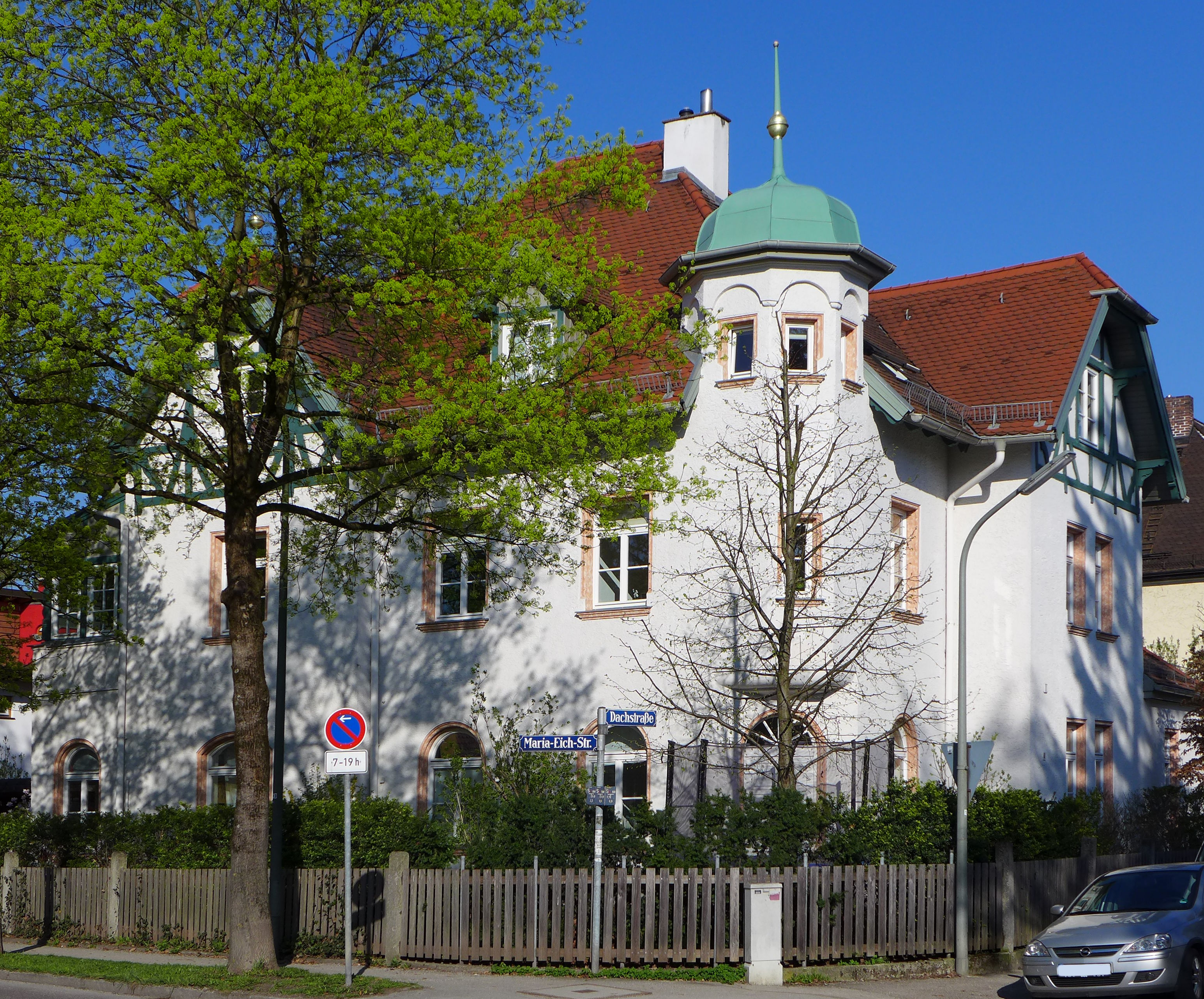 Dachstr. 33, München